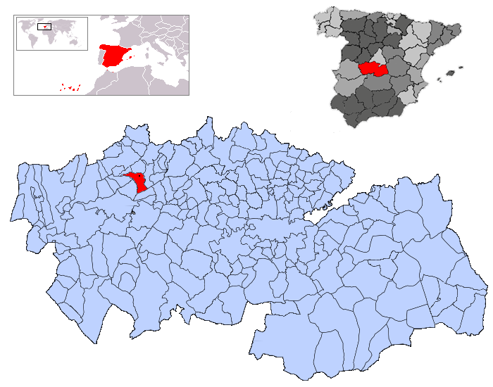 San Román de los Montes en la provincia de Toledo